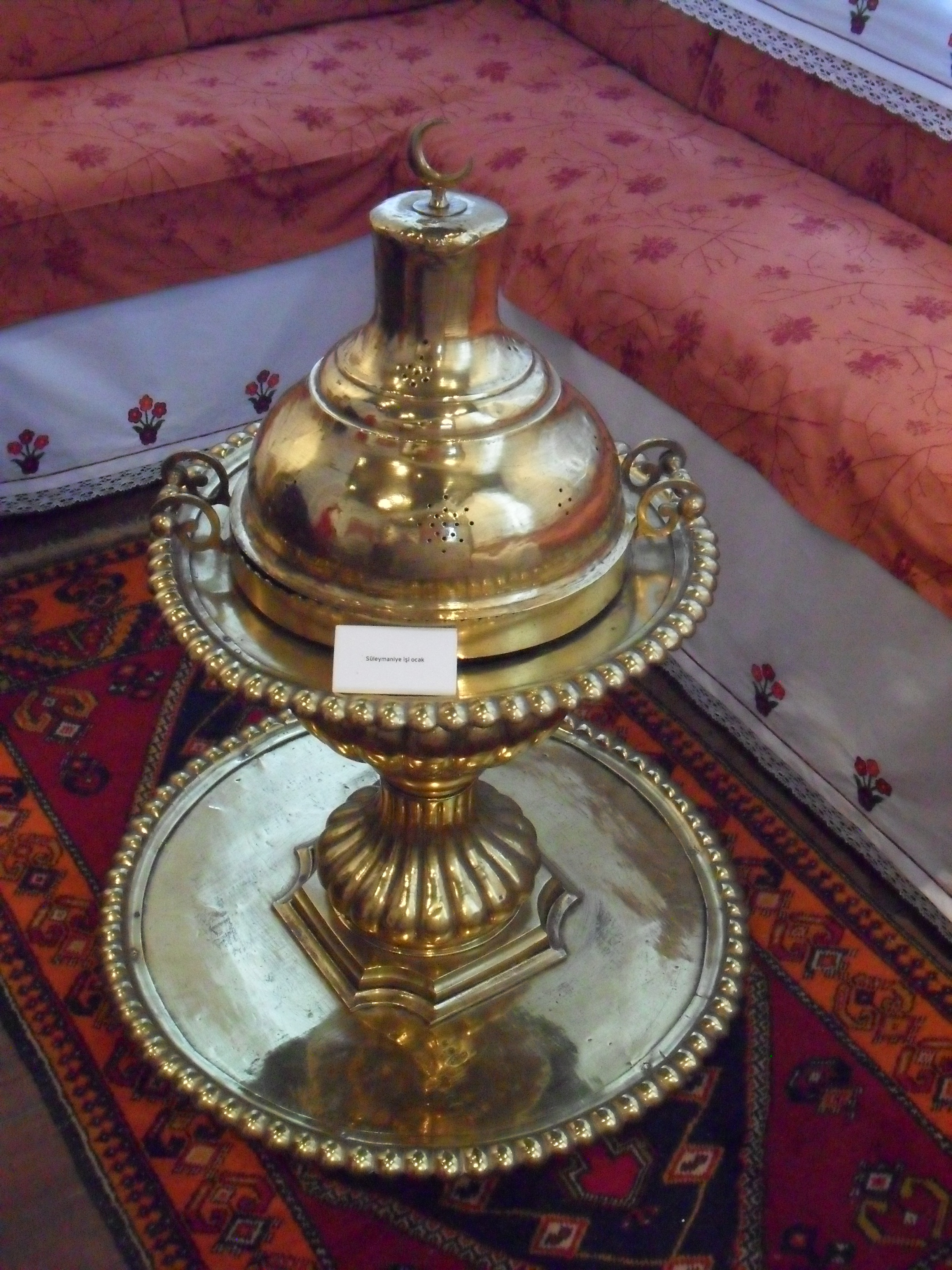 Samsun Kent Müzesi'nde sergilenen süleymaniye işi ocak.